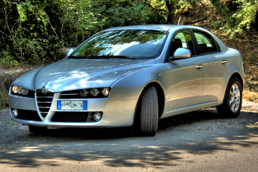 Alfa 159